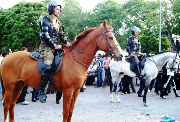 Конная полиция Азербайджана перед стадионом имени Тофика Бахрамова во время патрулирования футбольной встречи сборной Азербайджана